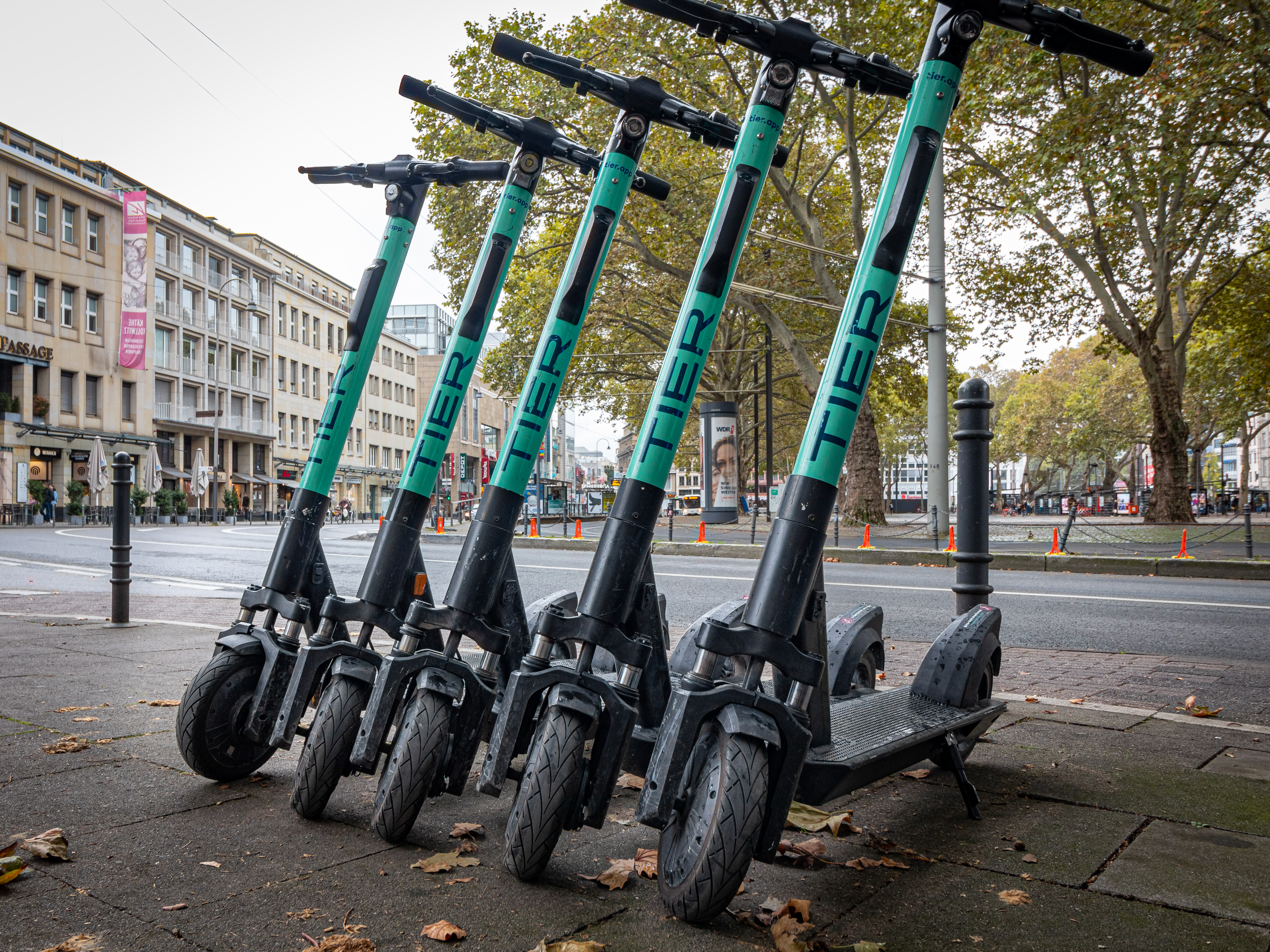 E-Scooter von Tier am Kölner Neumarkt